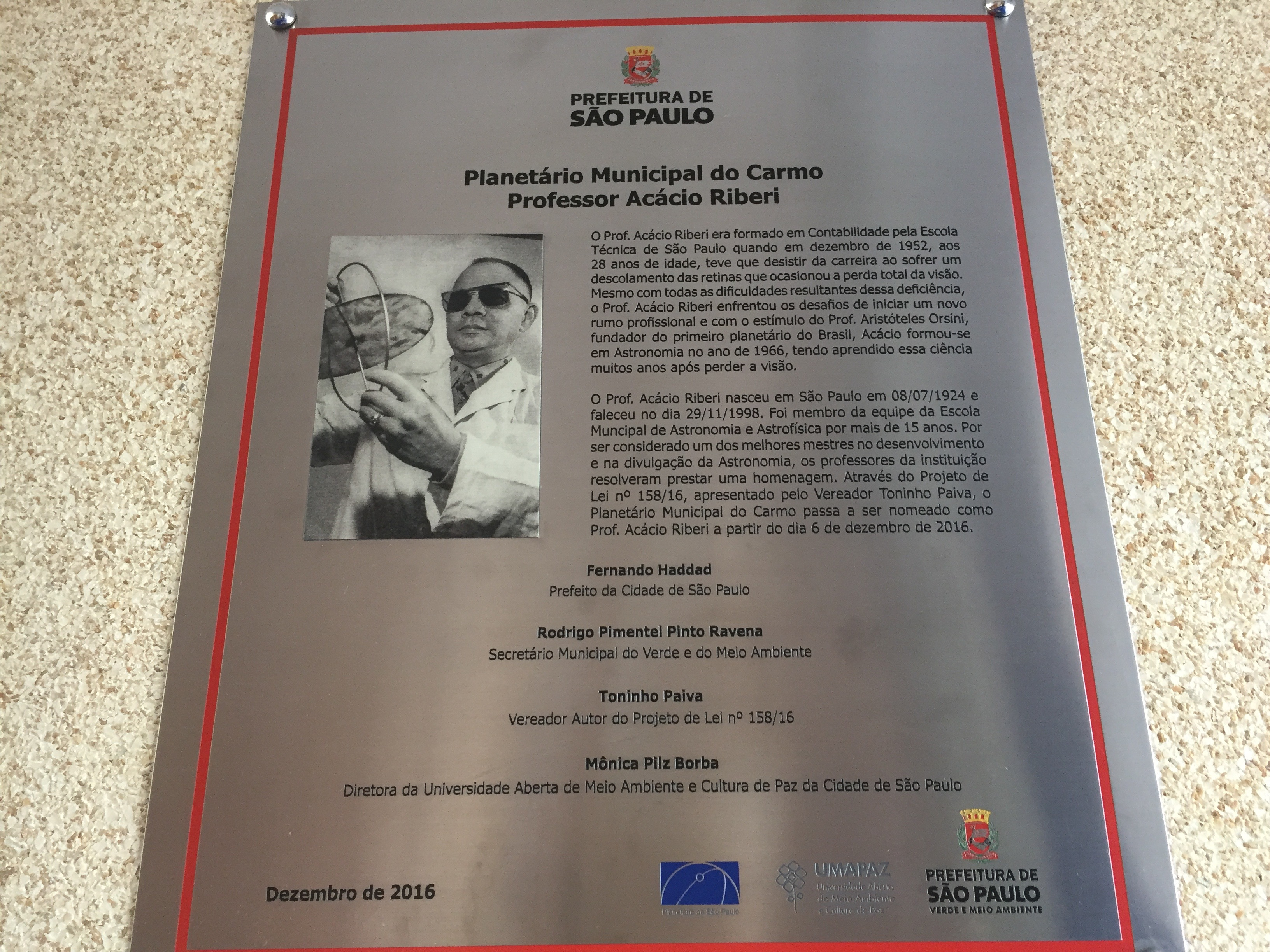 Placa informativa oficial da Prefeitura de São Paulo contendo informações sobre Professor Acácio Riberi, de onde veio o nome do Planetário do Carmo (Planetário Municipal do Carmo Professor Acácio Riberi).